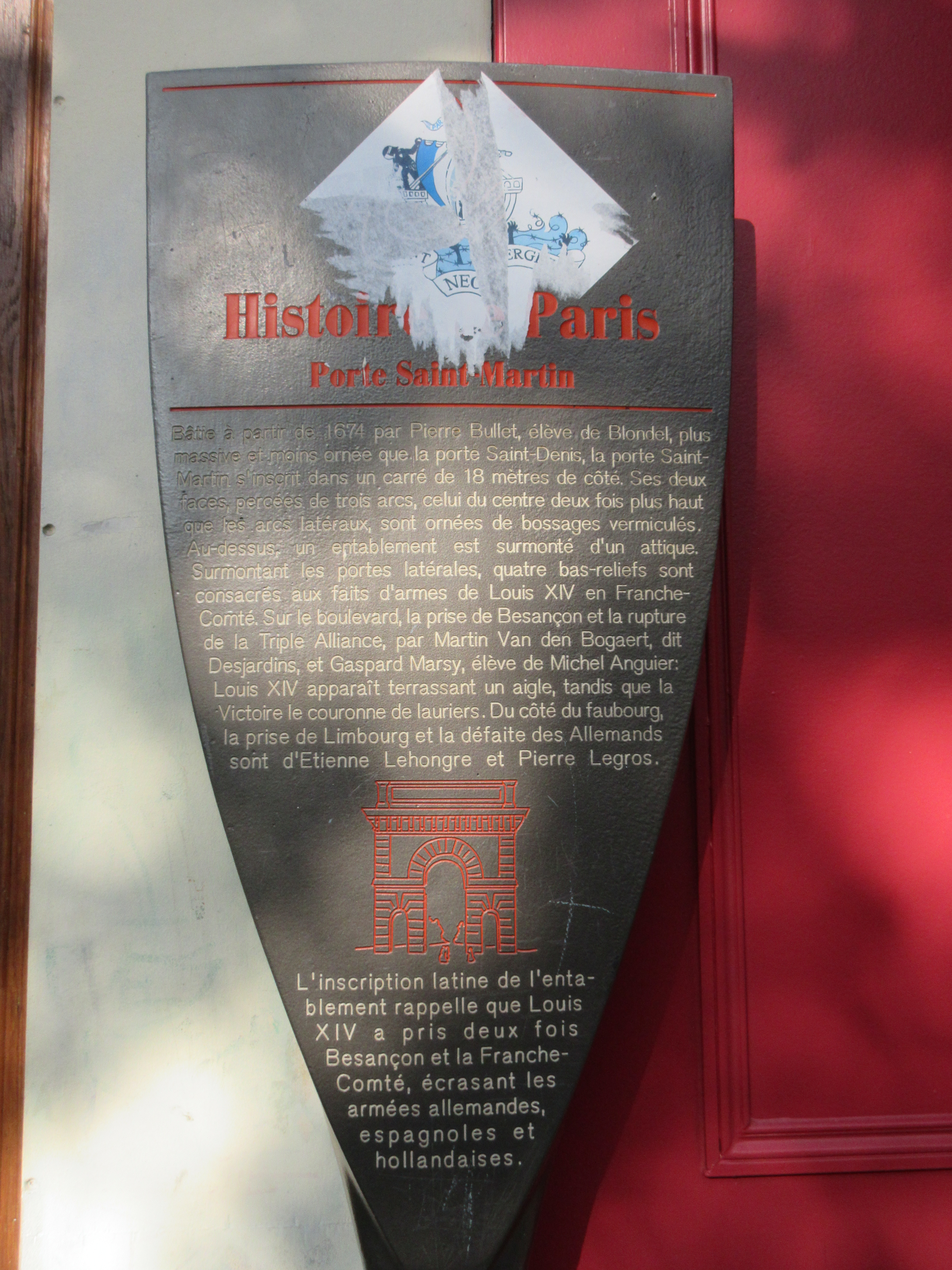 Panneau Histoire de Paris « Porte Saint-Martin »